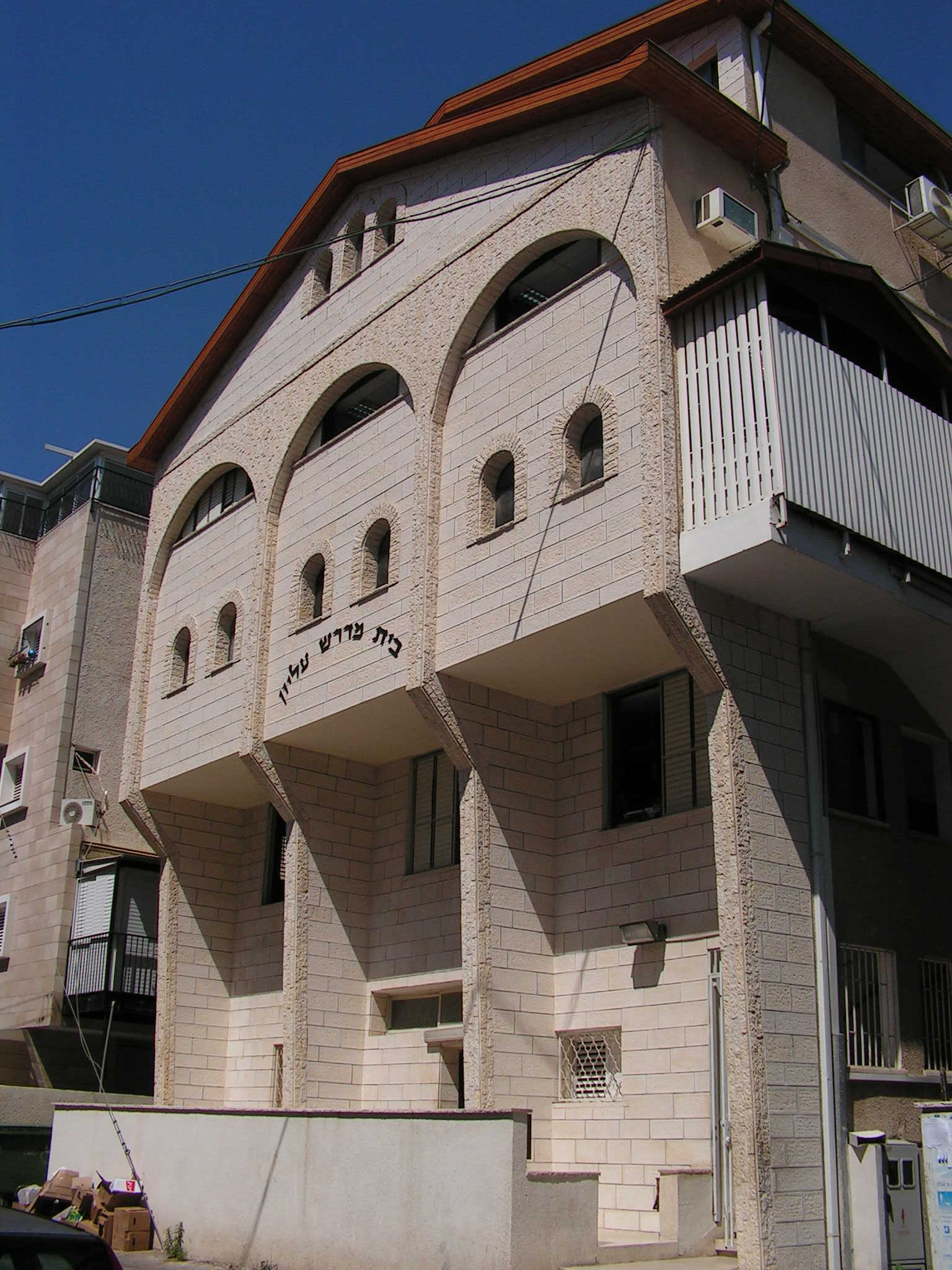 הבית כפי שהוא נראה היום